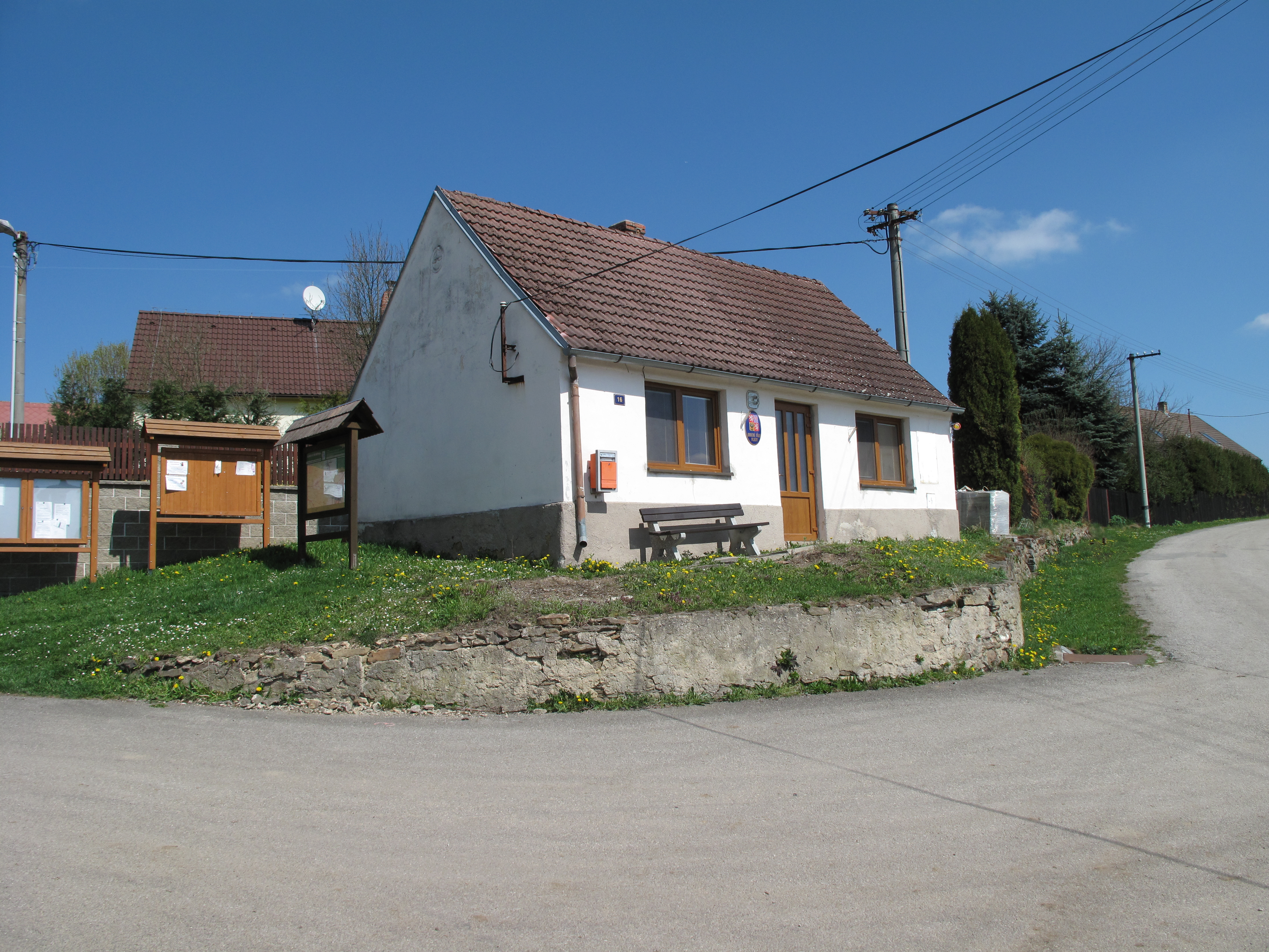 Obecní úřad ve Vlkově. Okres České Budějovice, Česká republika.